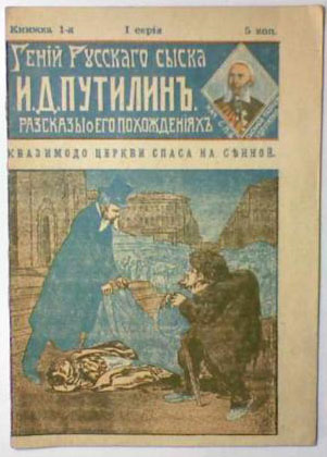 Гений русского сыска И. Д. Путилин (книга-рассказ 1908 года).